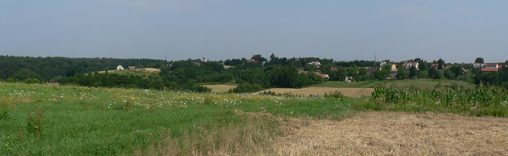 Koszyce Małe, przysiółek Wola Ostrębowska, widok od południowej strony, 2006 rok.